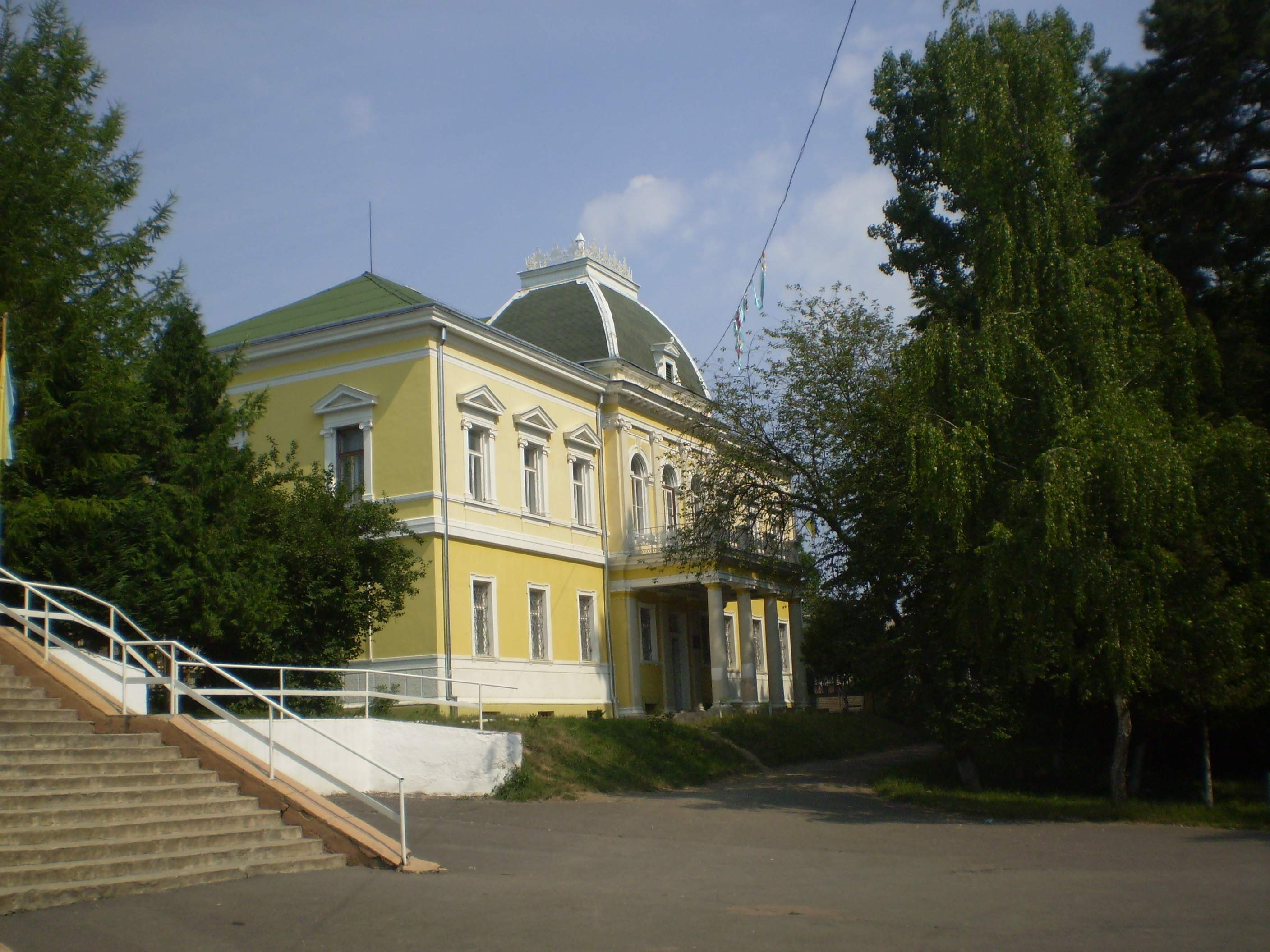 Село Великі Лази, Ужгородський район, Закарпатська область. Палац графа Плотені (кінець 19 ст.)